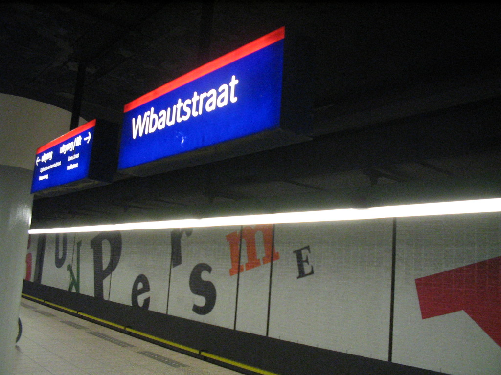 Metrostation Wibautstraat (Amsterdam, Netherlands), july 2005